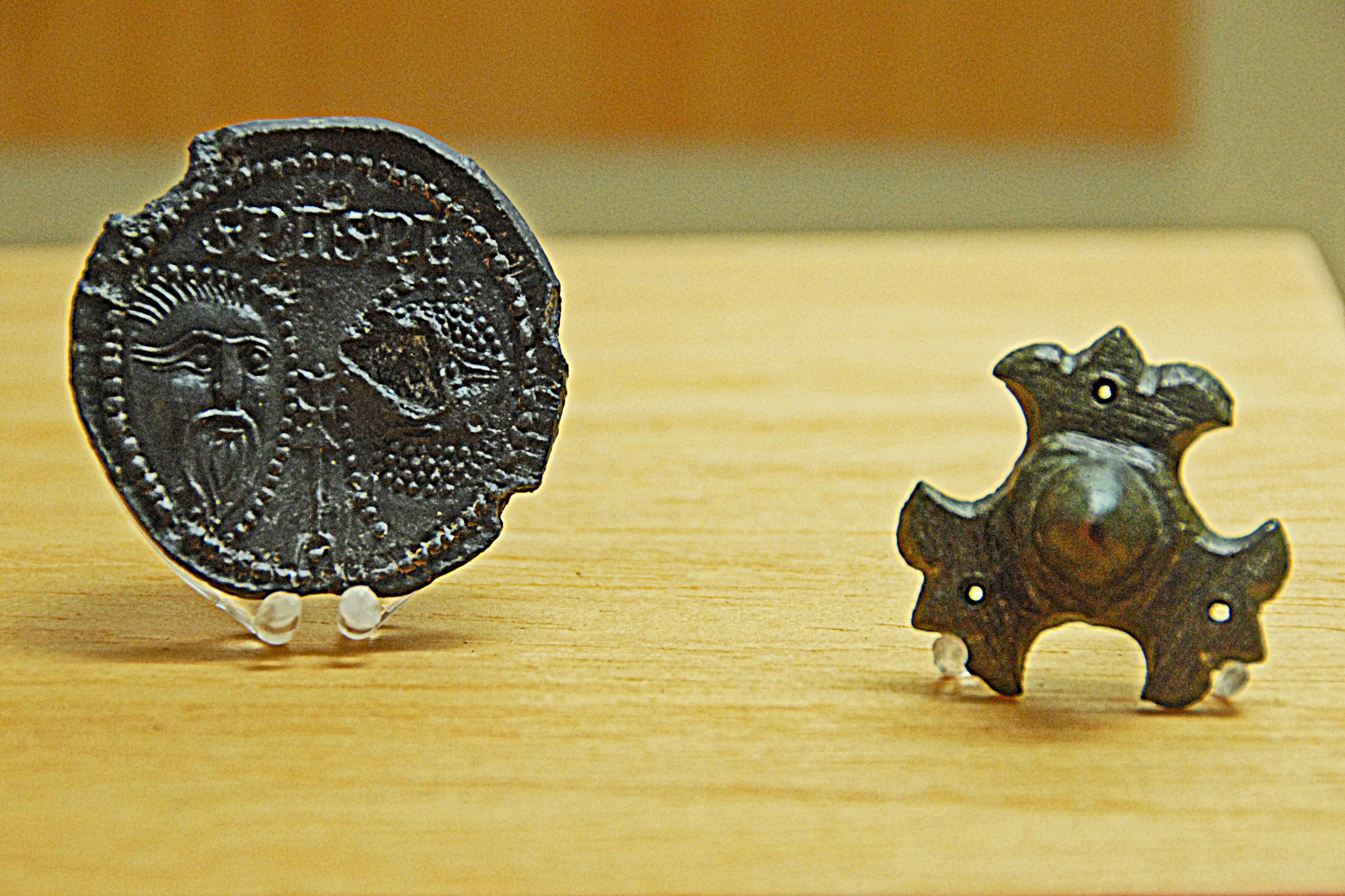 Civaux, Museum, Bleisiegel einer Bulle von Clement VII.